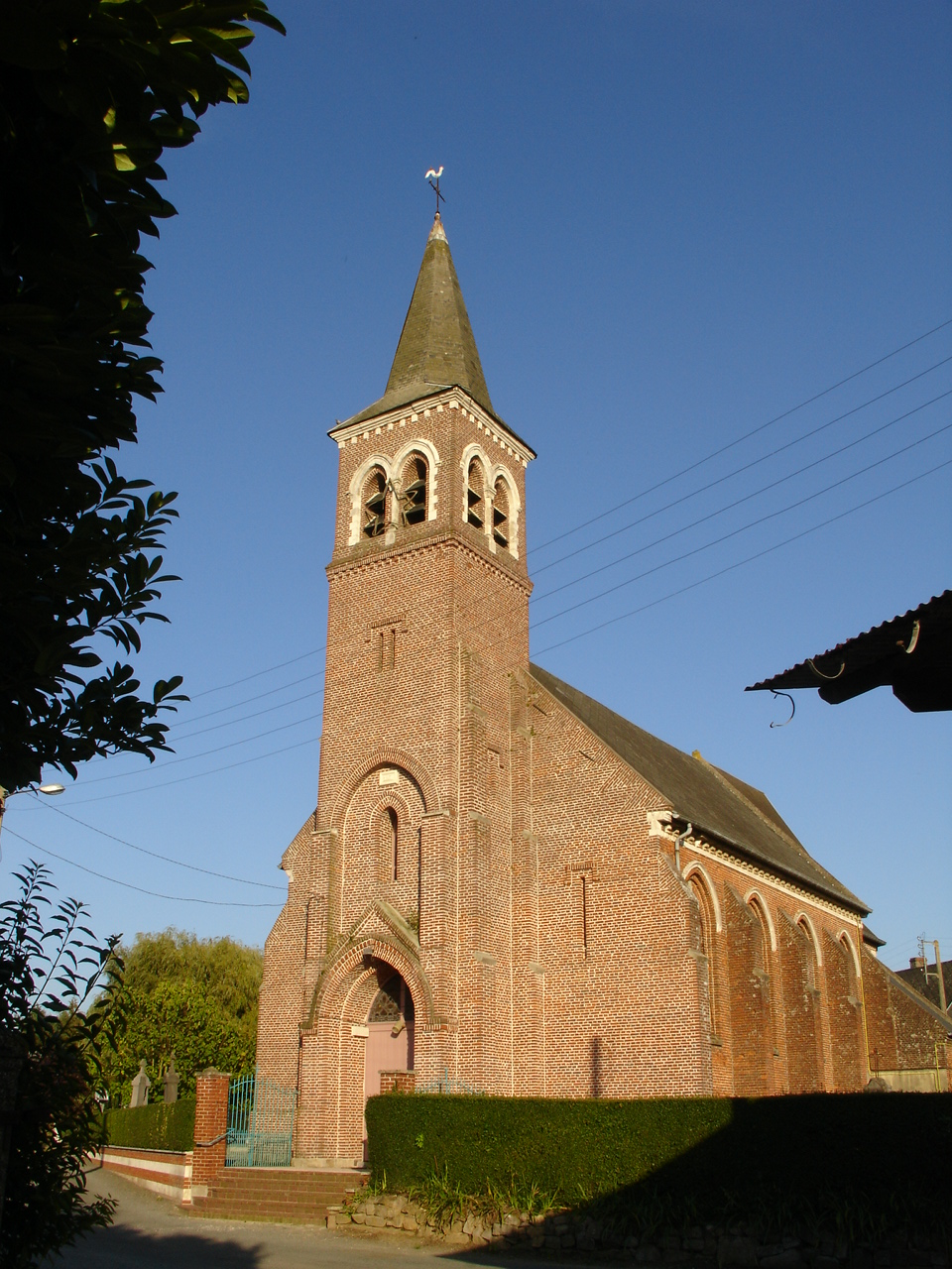 Église de Croisette